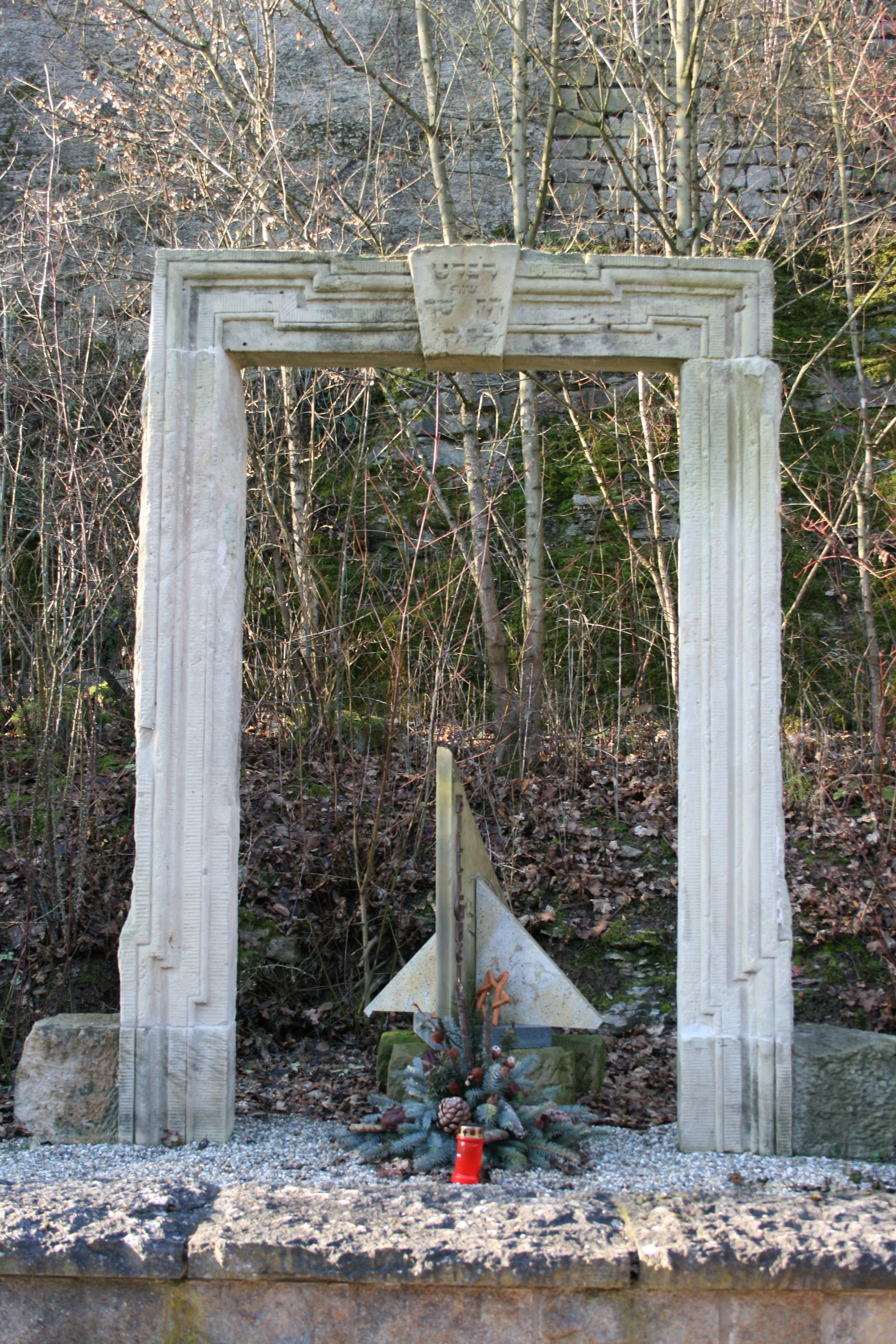 Denkmal für die ehemaligen jüdischen Mitbürgerinnen und Mitbürger in Billigheim. Eingangsportal der 1990 abgerissenen Synagoge.